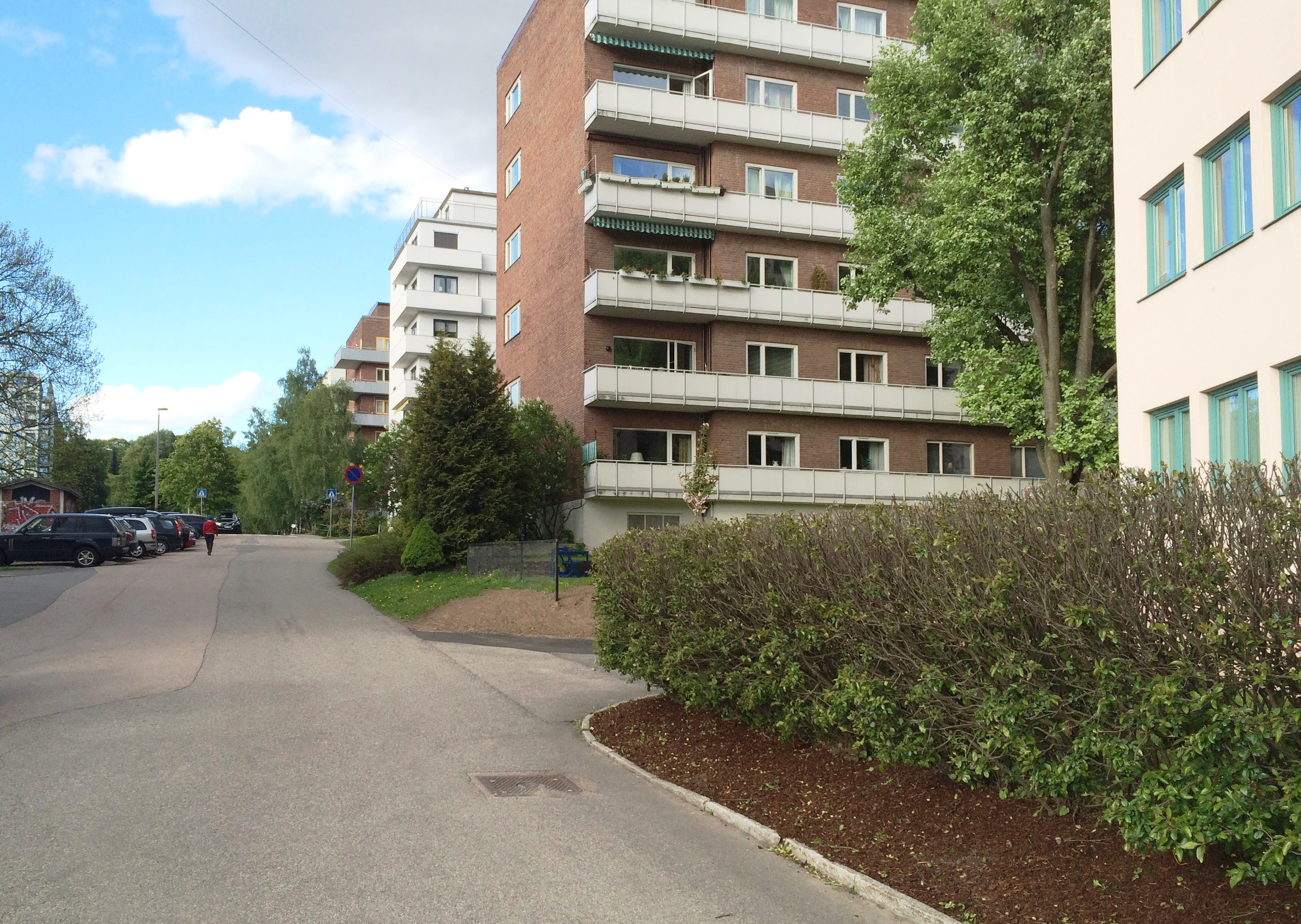 Wilhelm Færdens vei